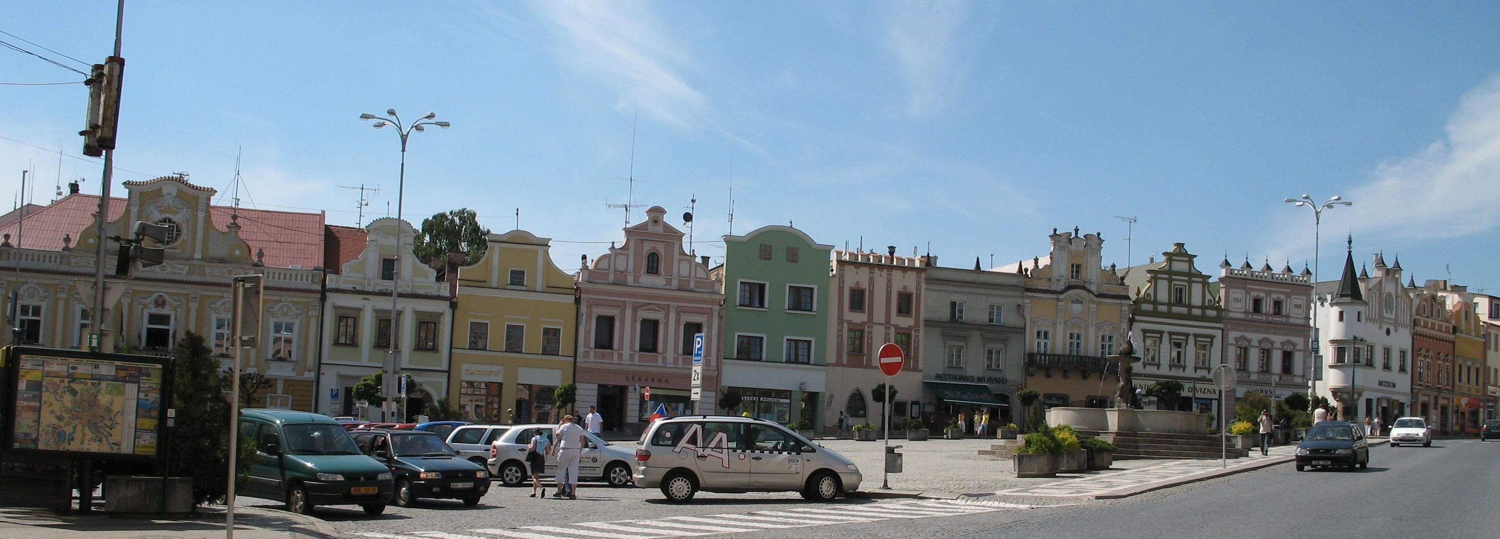 Hauptplatz von Havlickuv Brod